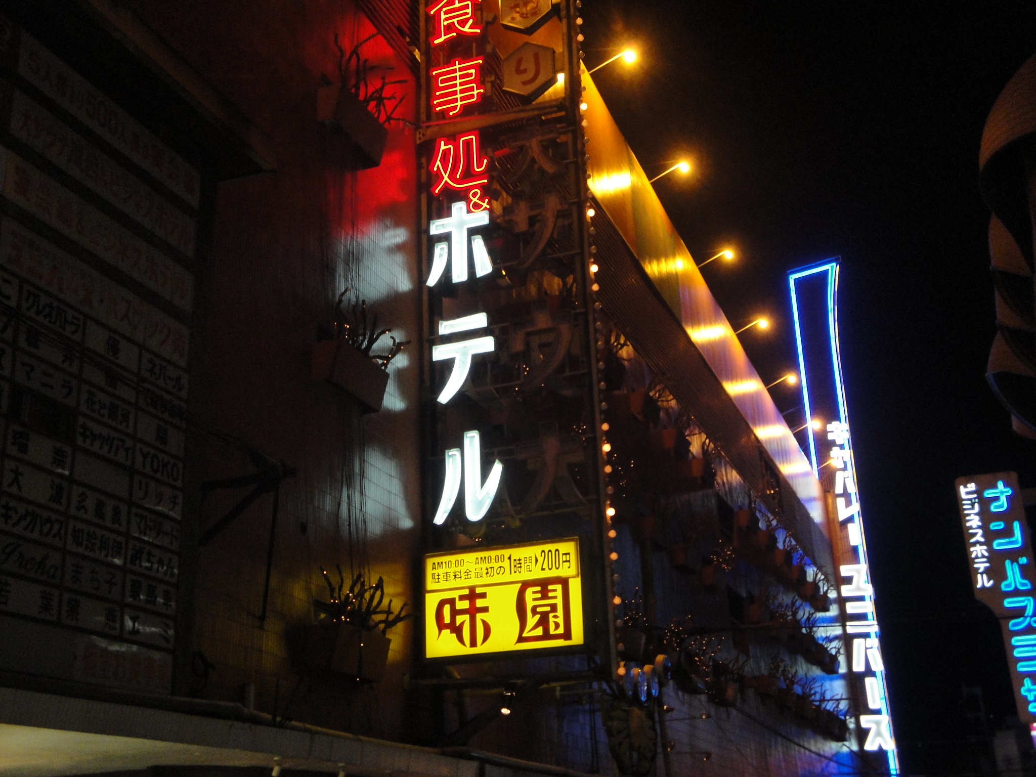 味園ユニバースビル